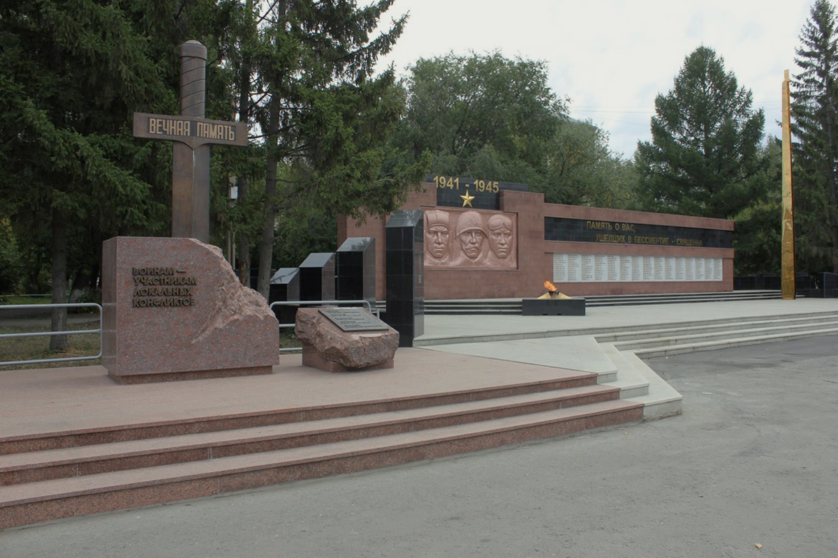 Мемориал жителям Южноуральска, павшим в Великой Отечественной войне и локальных конфликтах